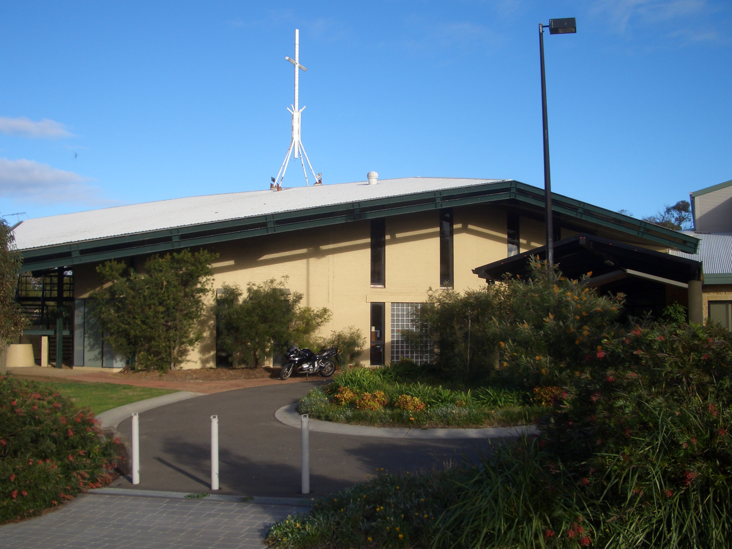 Barden Ridge_St Pauls Anglican Church